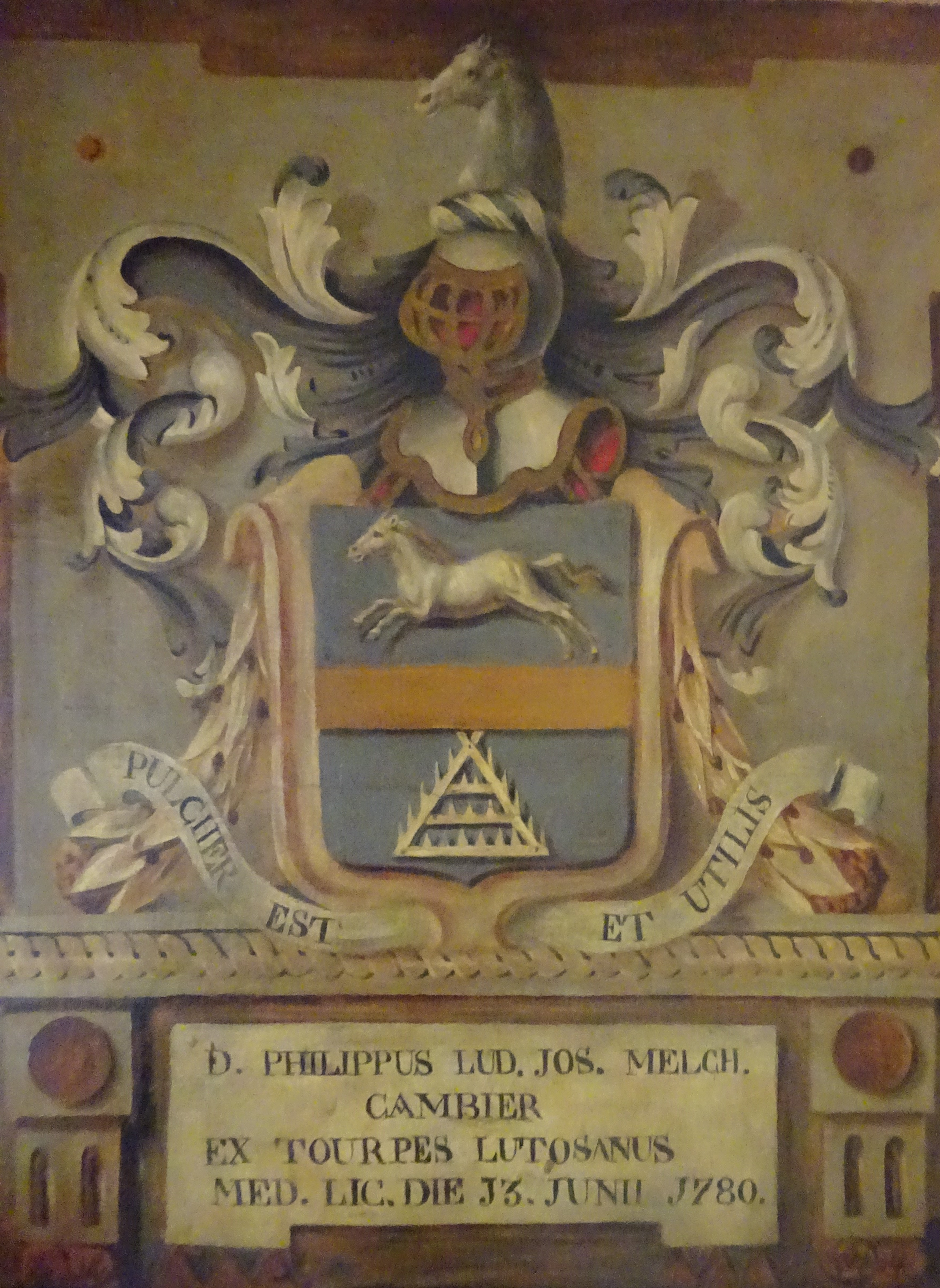 armoiries accordées à Philippe-Louis-Joseph-Melchior Cambier lors de sa promotion en tant que médecin le 13 juin 1780